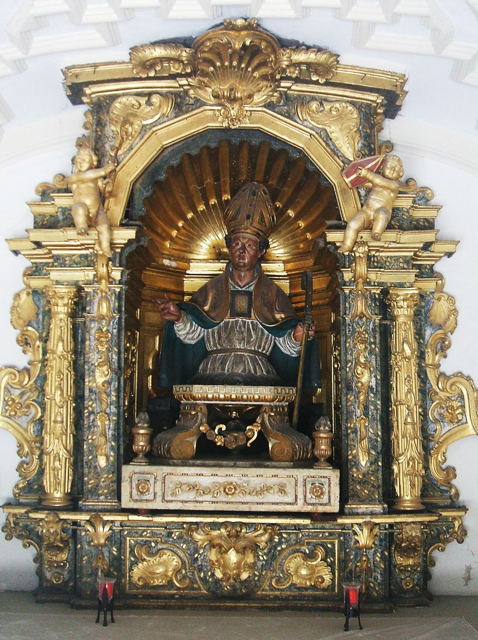 Retablo barroco con el busto del santo, en la Capilla de San Pedro de Osma, sita en la c/Pintorería de Vitoria-Gasteiz, País Vasco, España